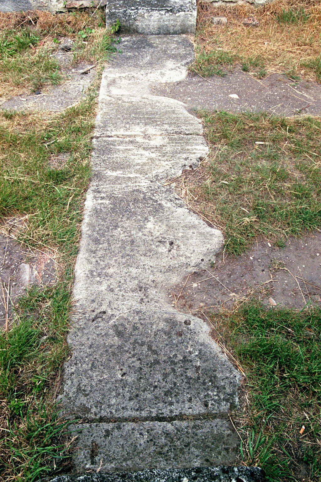 Kastell Tokod, Ungarn: Schwelle mit Radspuren an der nördlichen Hauptzufahrt. This is a photo of a monument in Hungary, Identifier: 6487